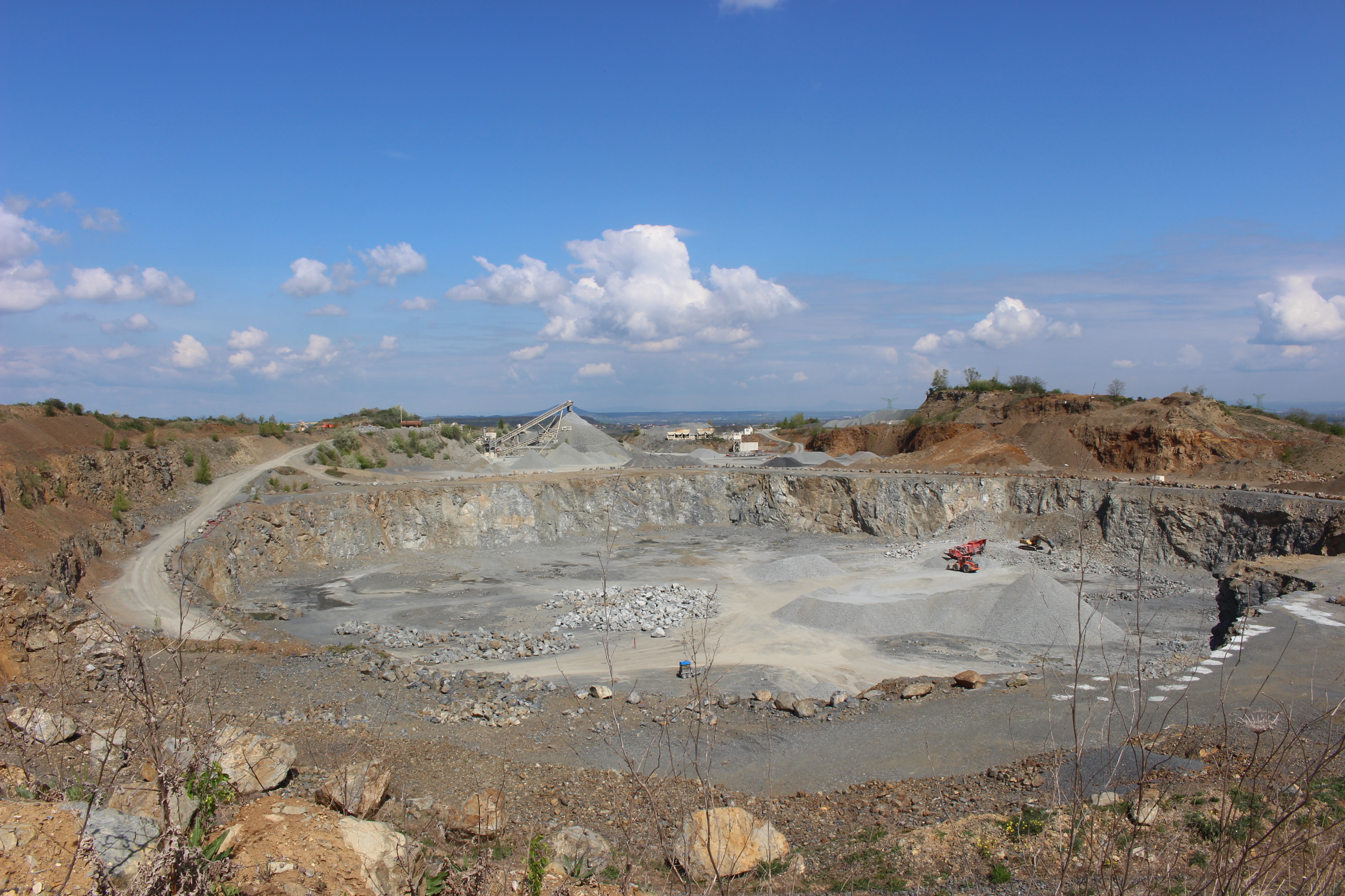 Lom Čenkov